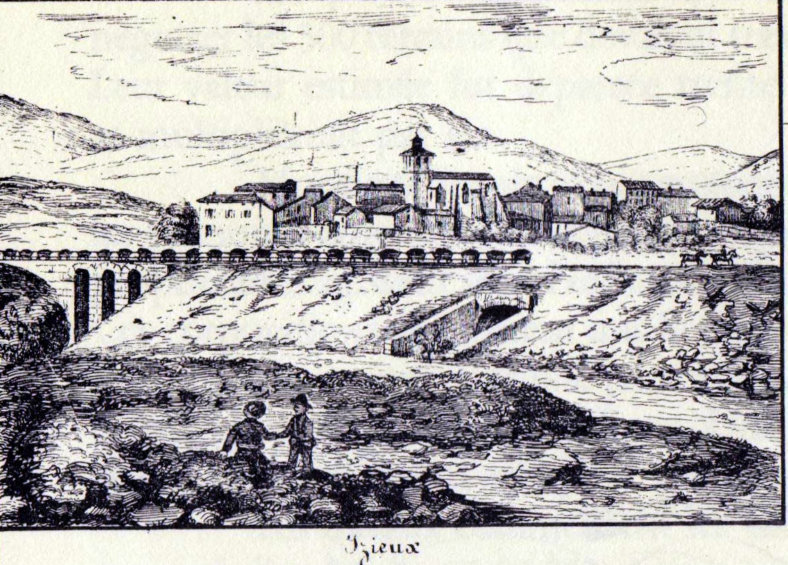 dessin